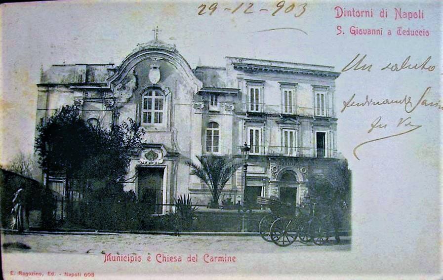 "Dintorni di Napoli . S, Giovanni a Teduccio - Municipio e Chiesa del Carmine". Cartolina. Autore sconosciuto.